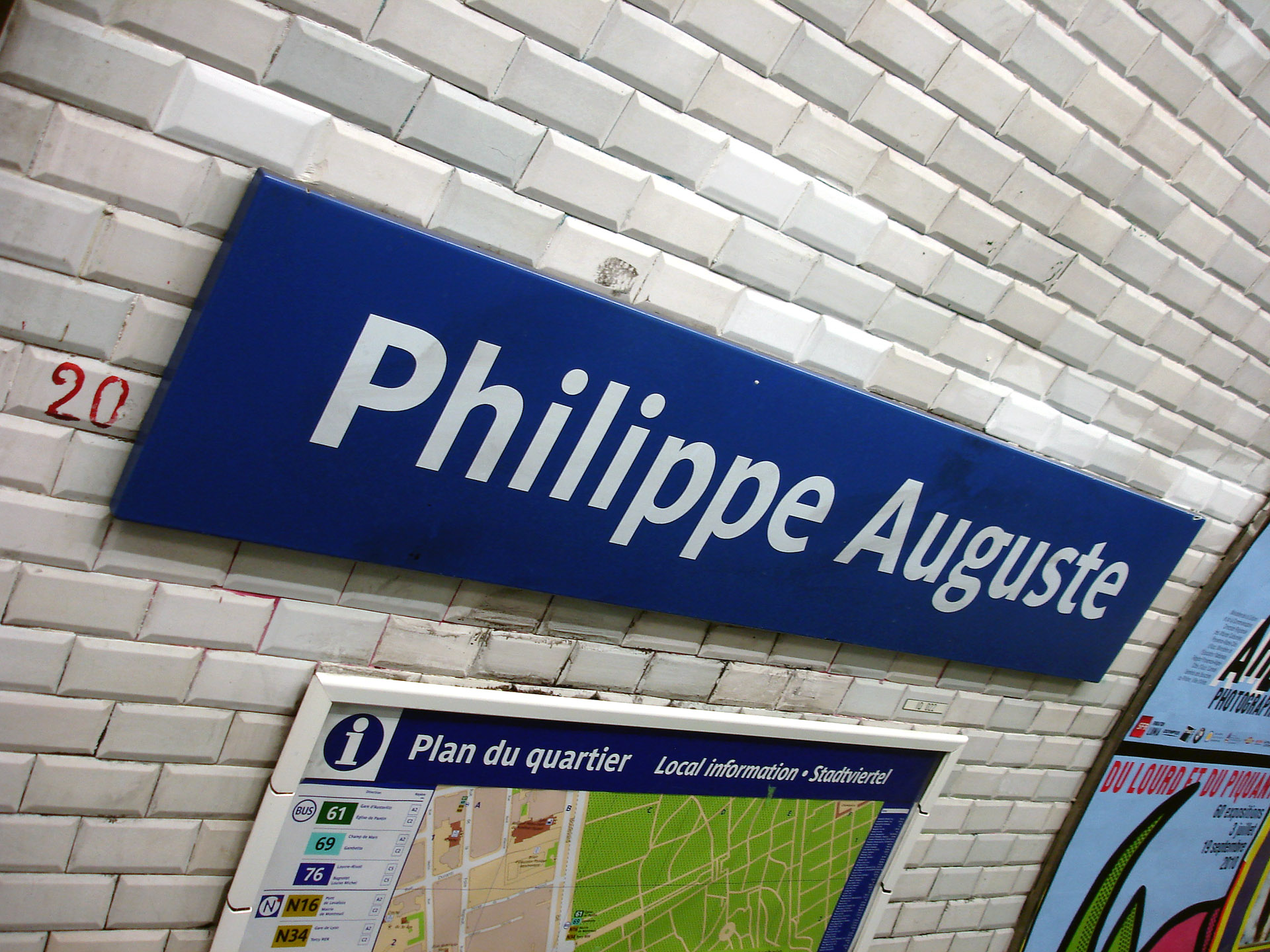 La station Philippe Auguste de la ligne 2 du métro de Paris, France